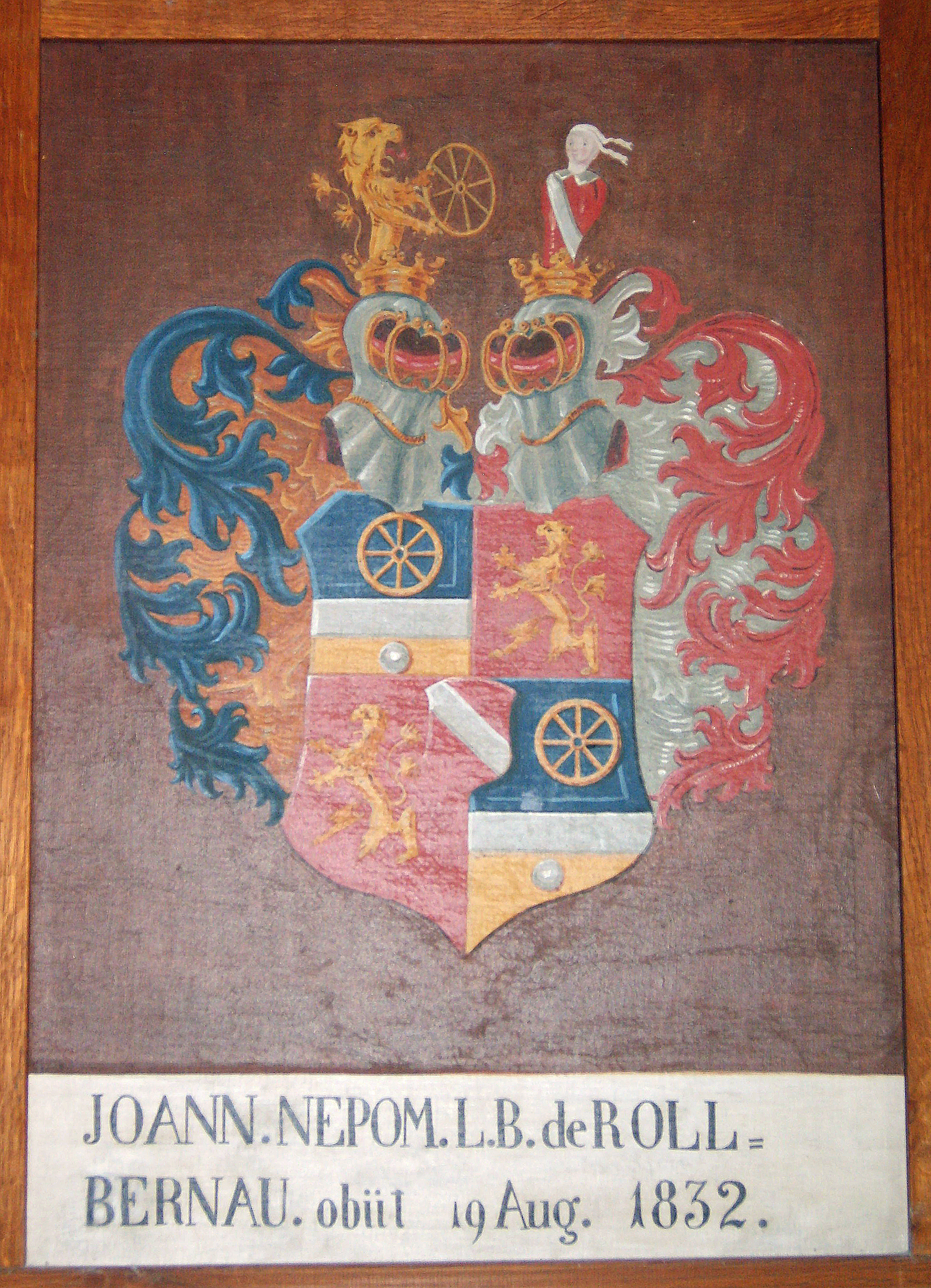 Konstanzer Münster Wappen im Kreuzgang Roll zuBernau